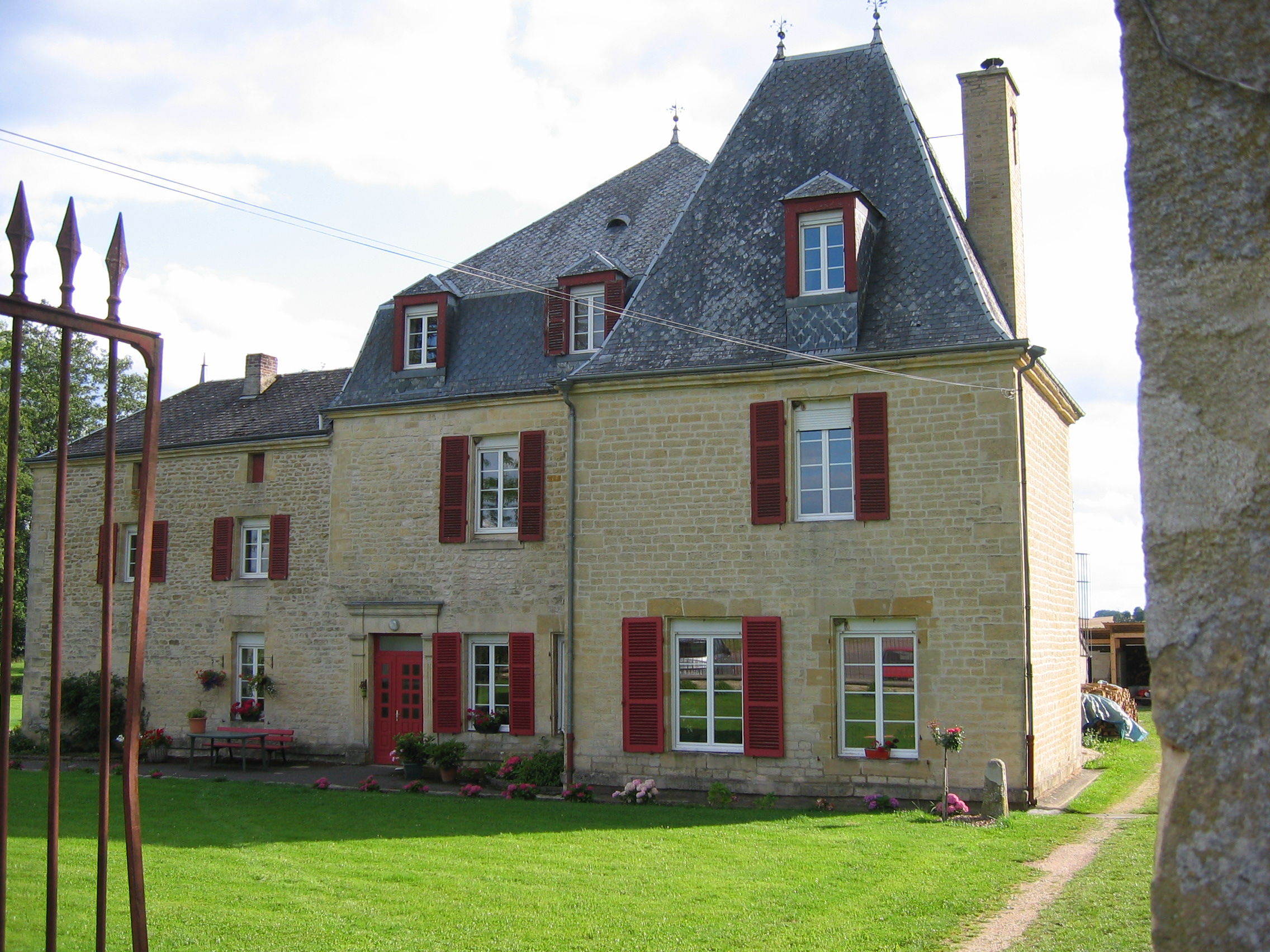 Château de Lametz vue 2 Ardennes France